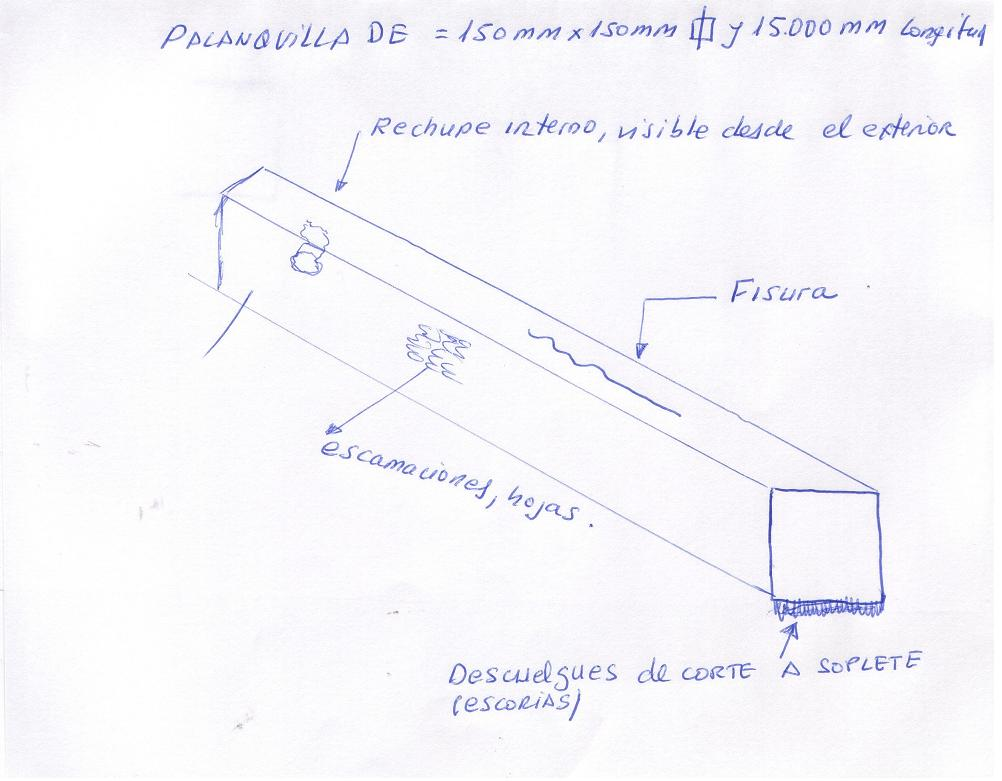 defectos de palanquillas procedentes de las acerias